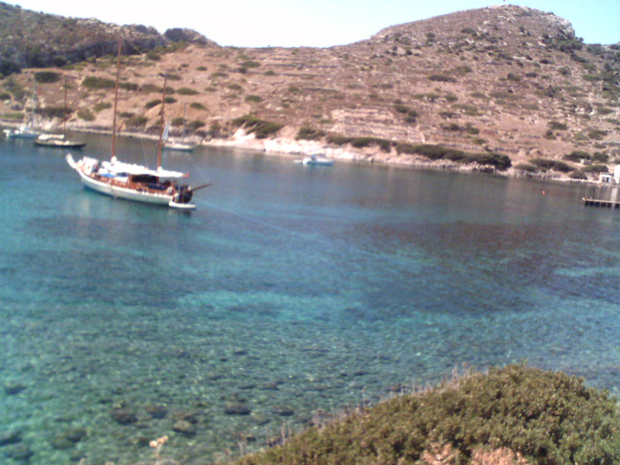 Dosya yükleyen kullanıcıya aittir. Resim Datça, Muğla'daki Knidos antik kentinde çekilmiştir.